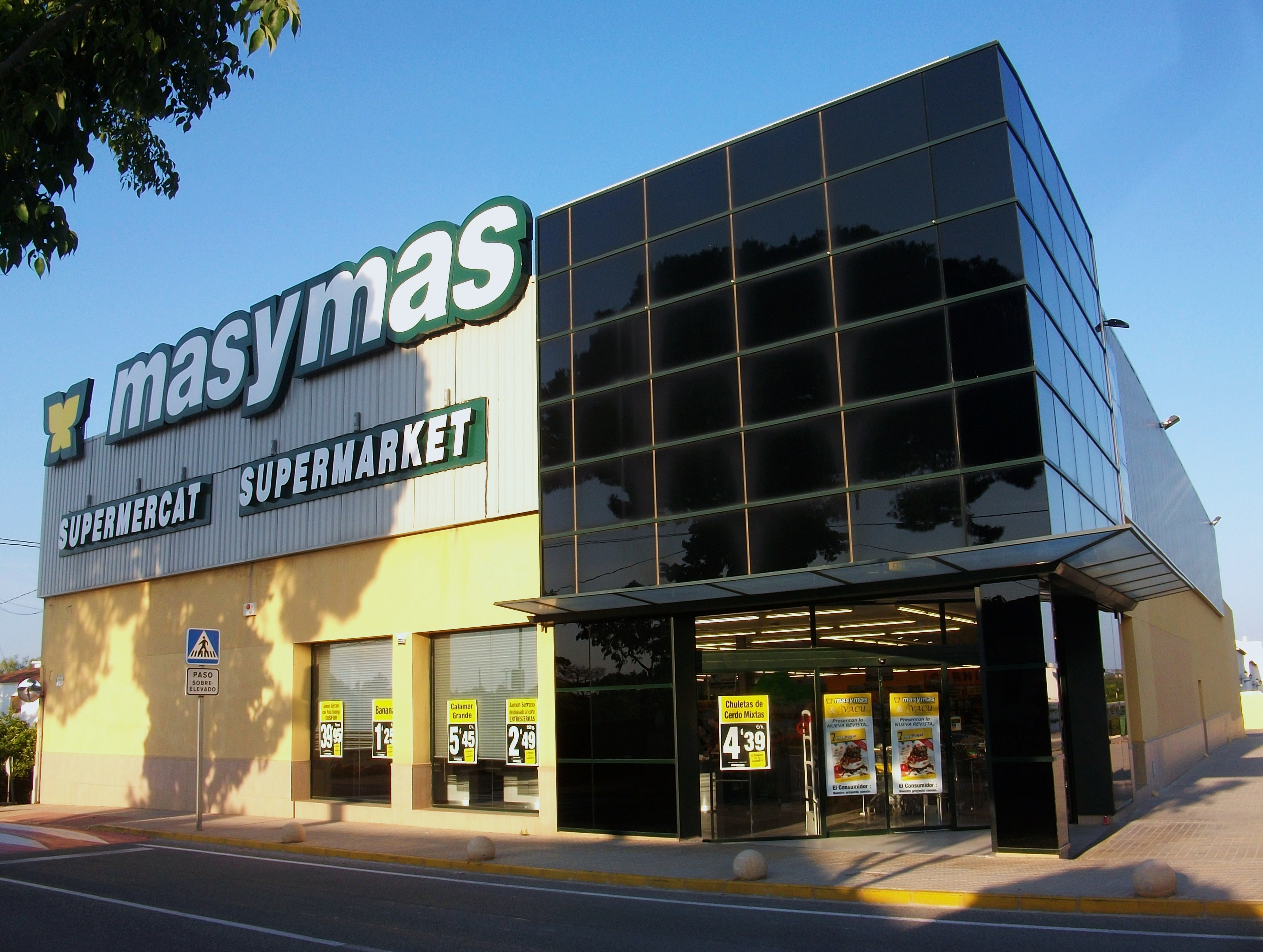 Supermecat MasyMas a la Xara, Marina Alta.